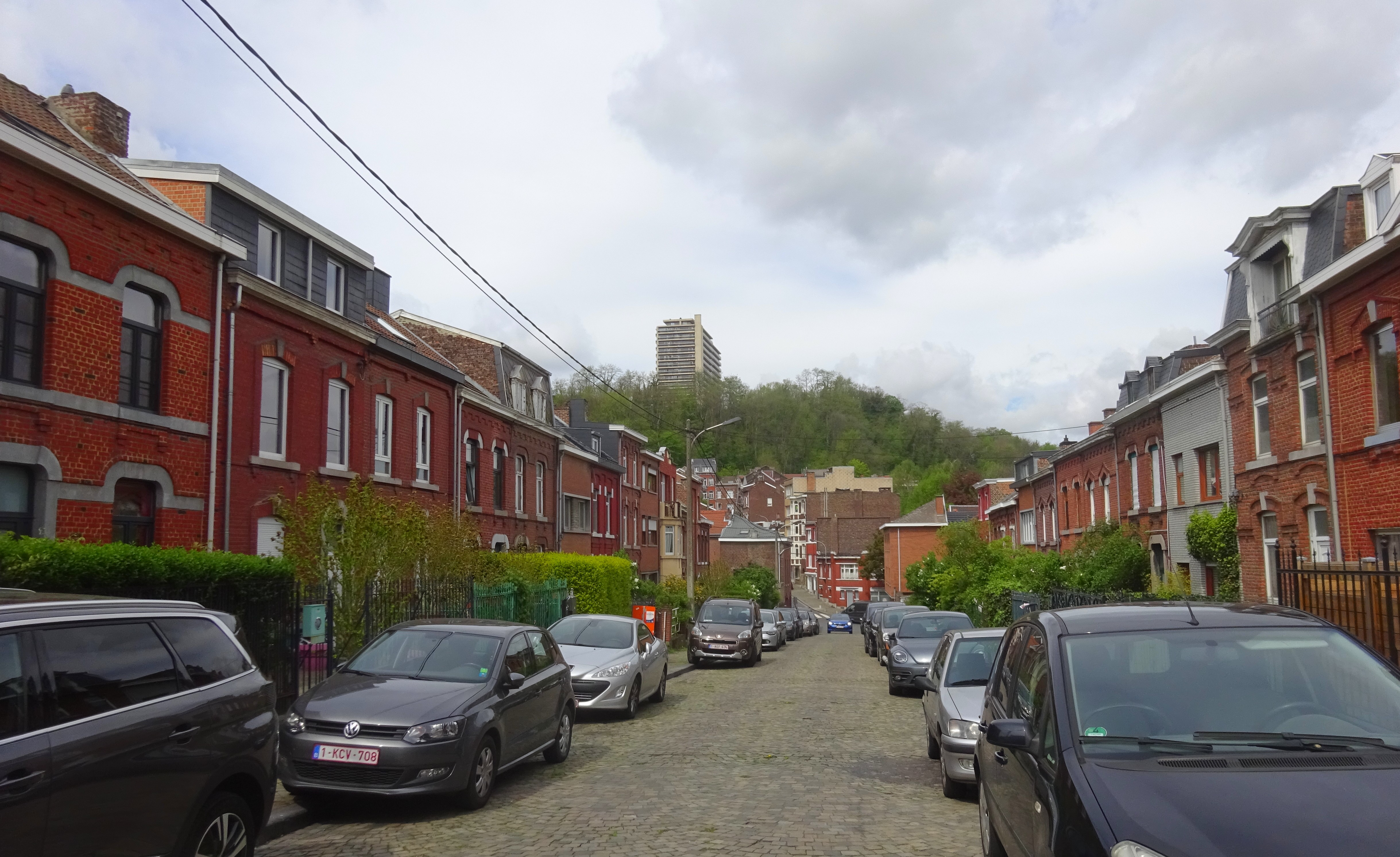 Rue Hézelon, Laveu, Liège